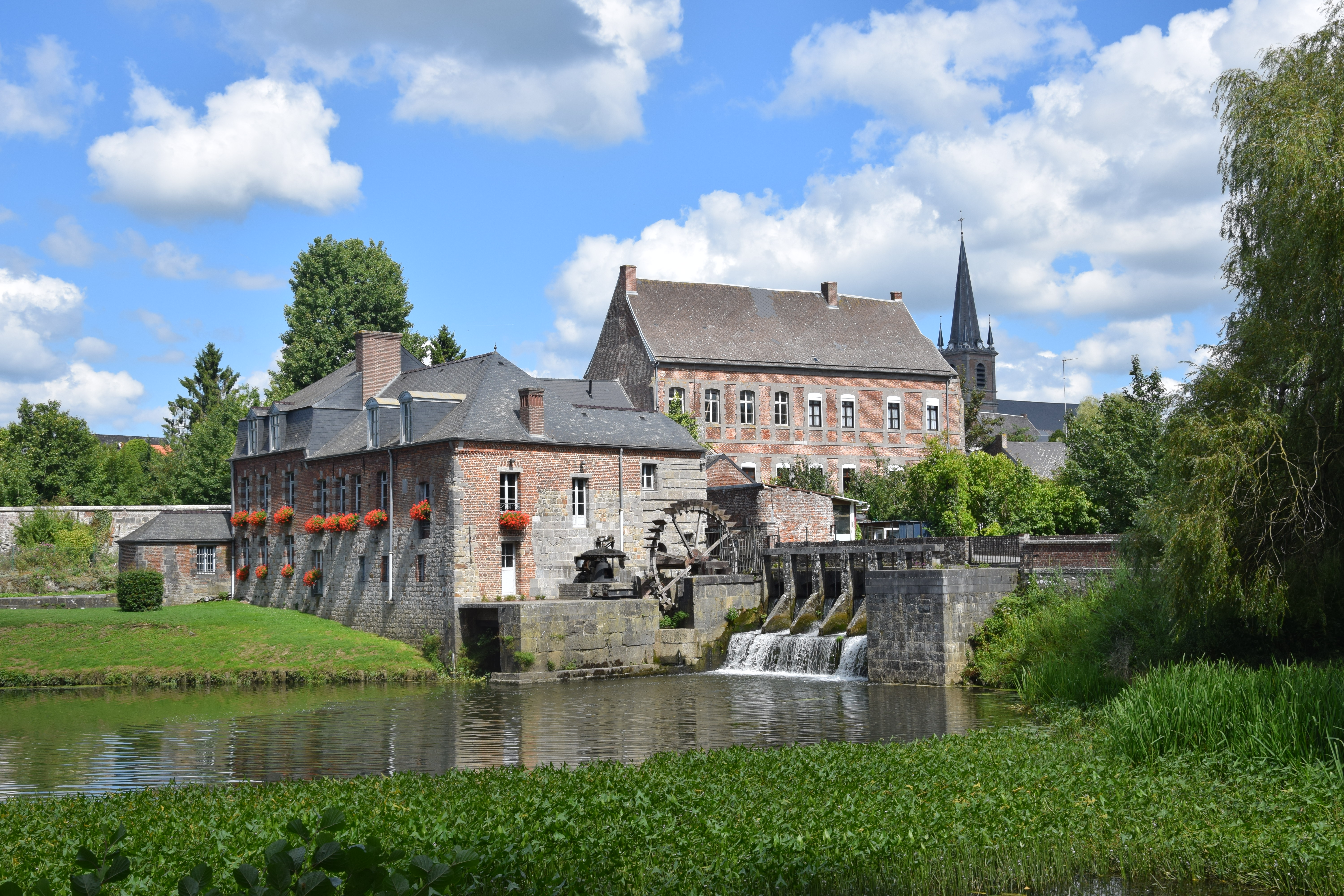 Moulin de l'Abbaye de Maroilles